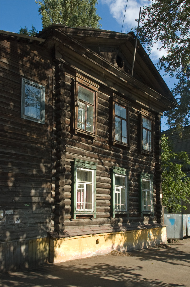 улица Крылова, 26а, Томск